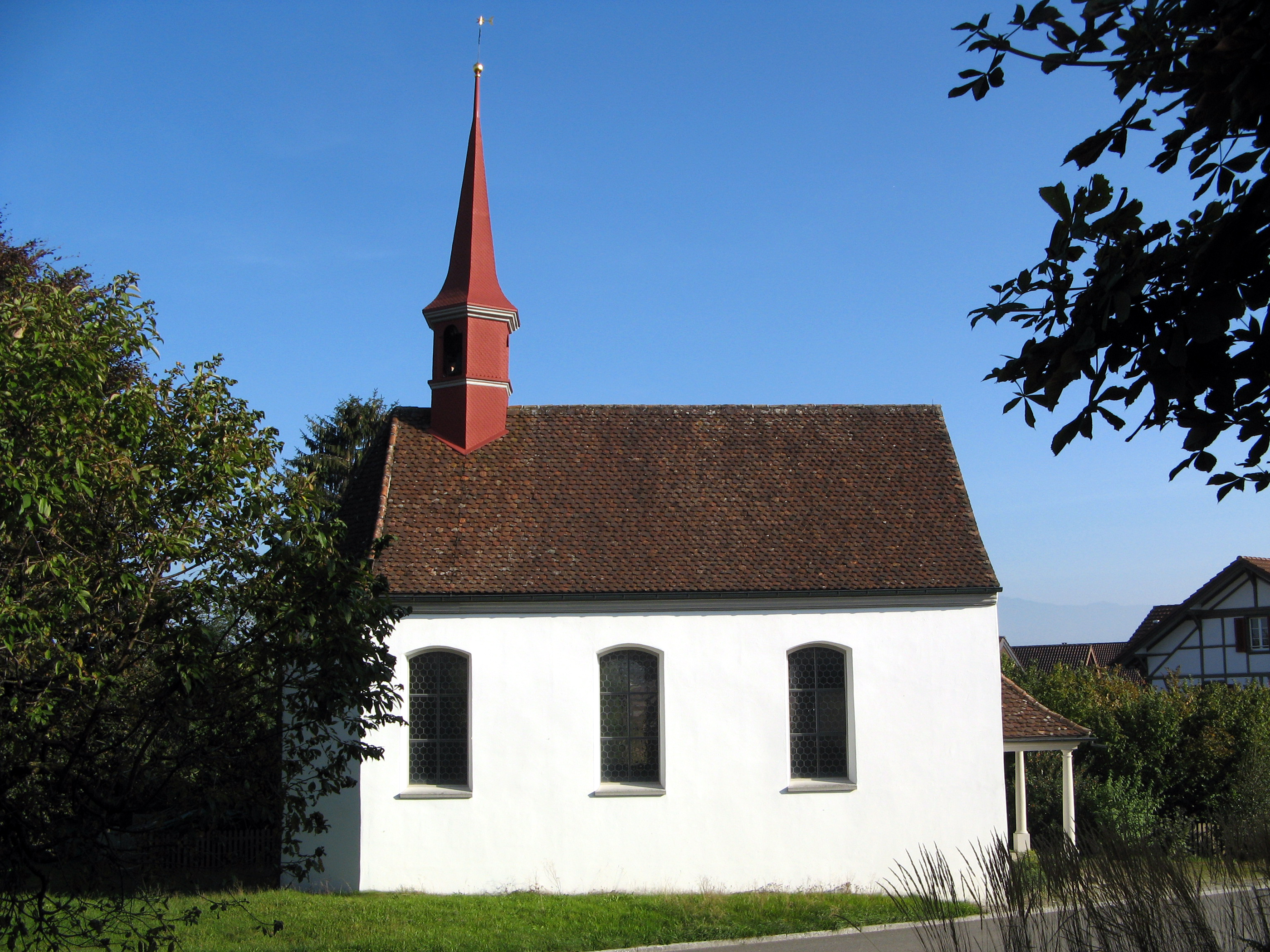 Kapelle St. Jost und Antonius von Padua in Alikon bei Sins, Aussenansicht von der Seite